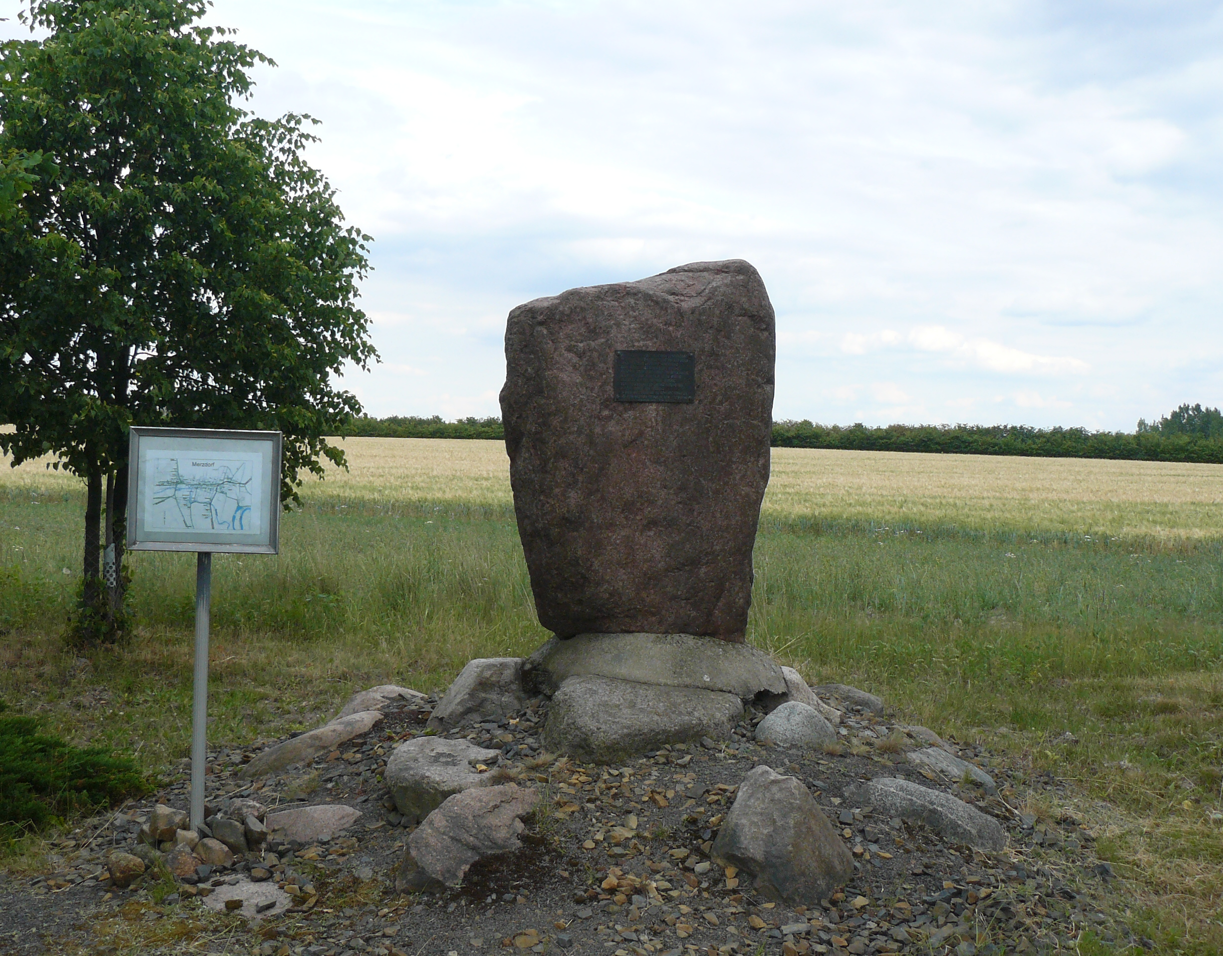 Merzdorf (bei Uhyst): Gedenkstein am Platz der Kirche